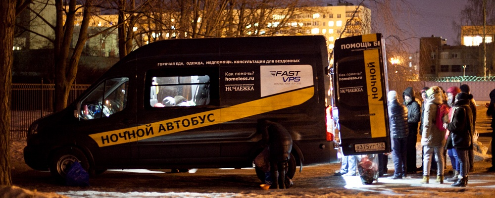 Ночной автобус